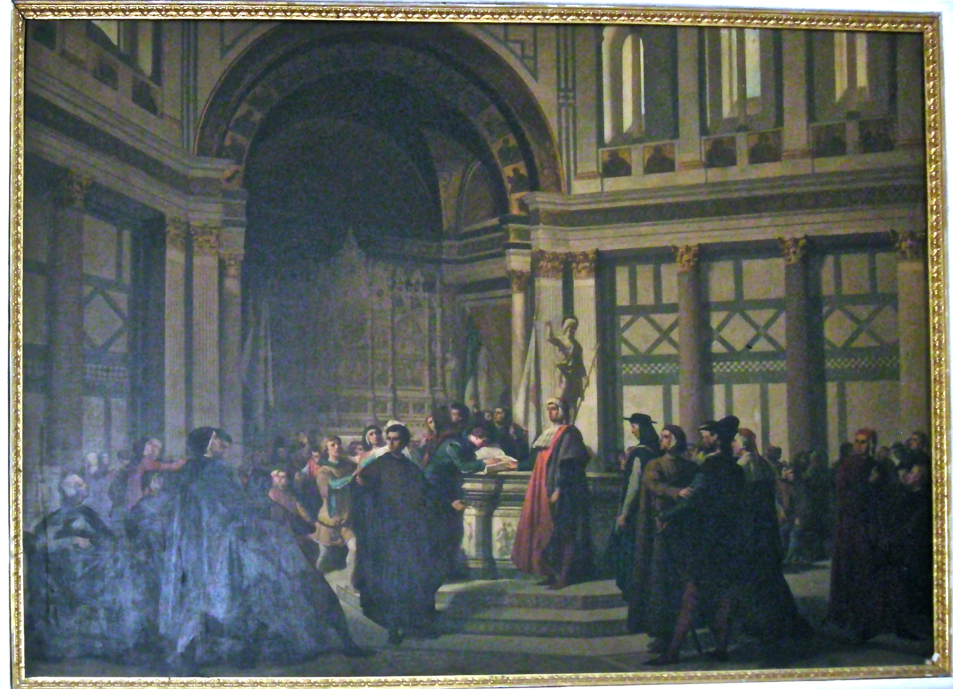 Dino Compagni in San Giovanni predica la pace tra guelfi e ghibellini